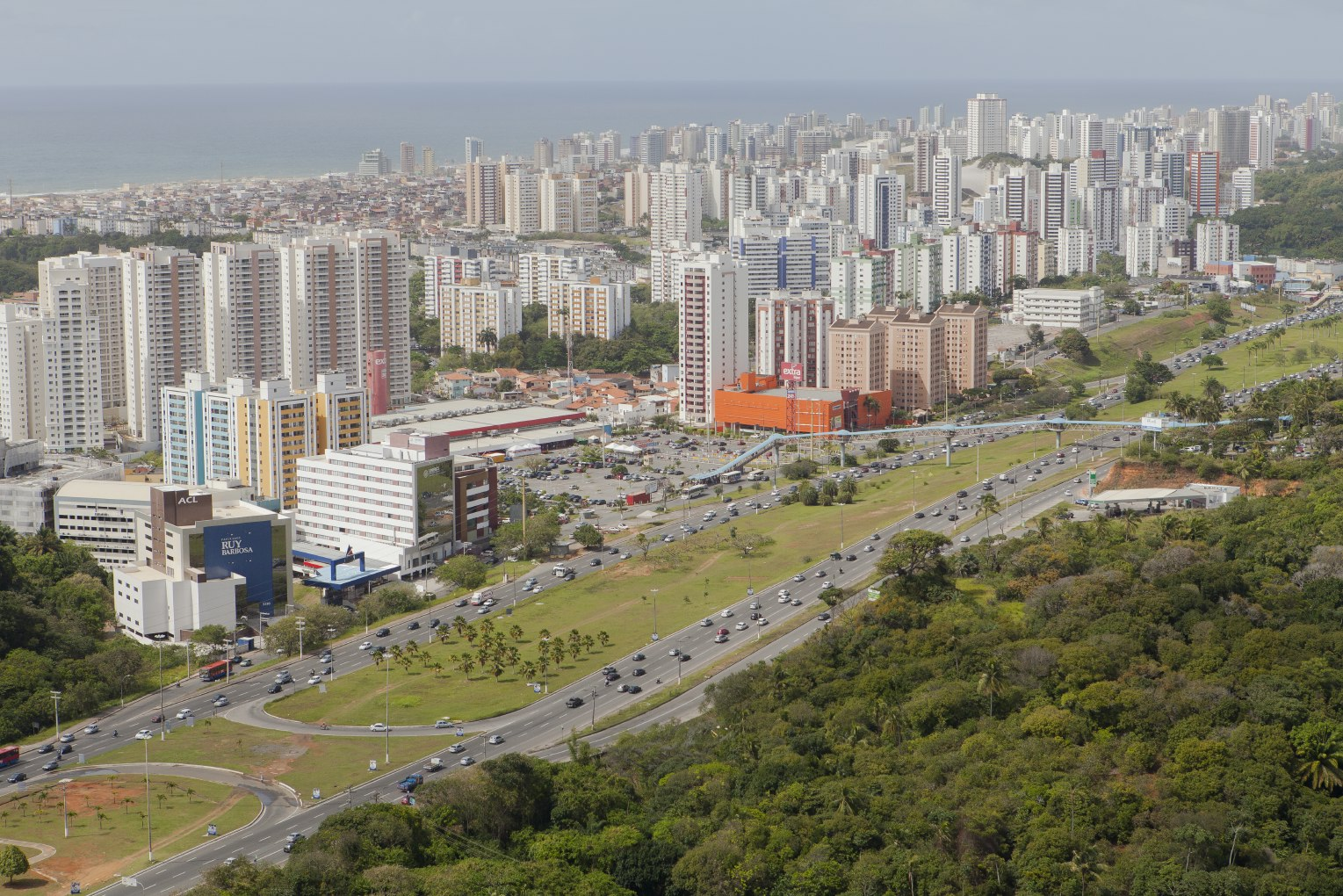 Imbuí e a Avenida Paralela, em Salvador.